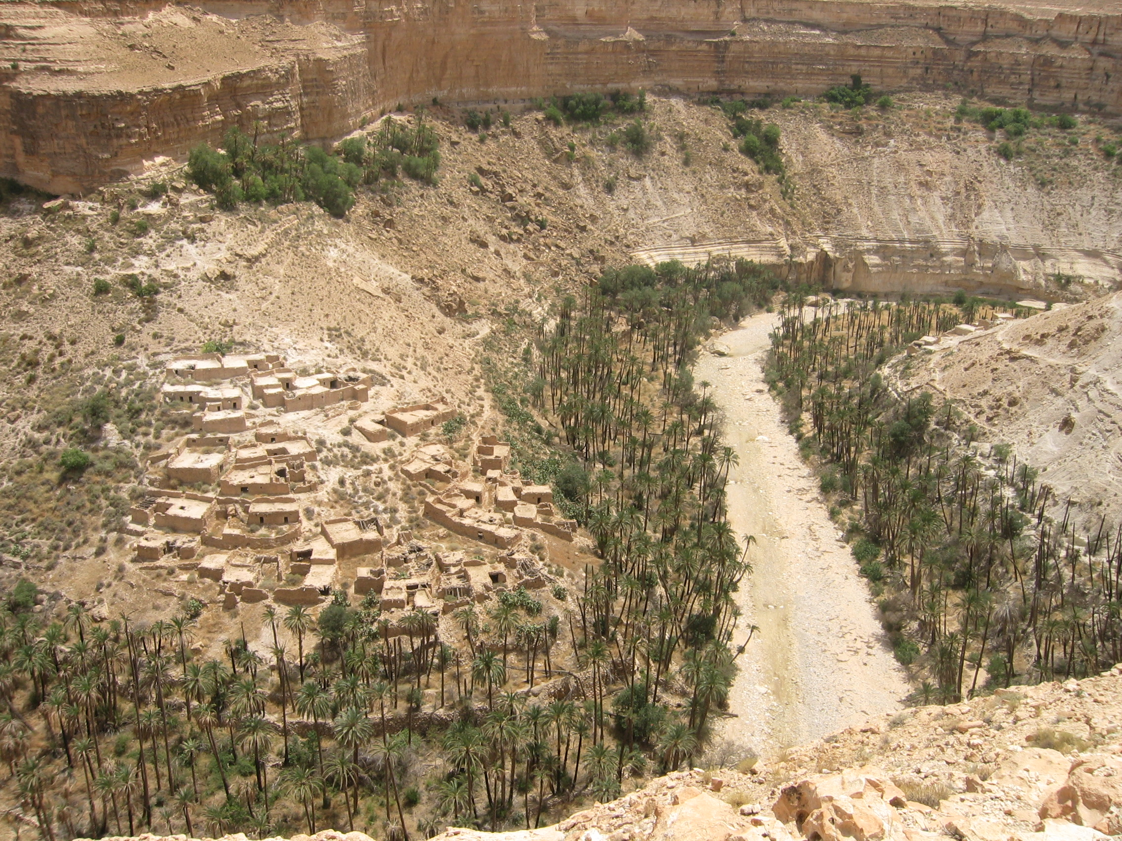 Ancien village de thitchalt de aït mansour dans le canyon du Ghoufi de la région des Aurès (wilaya de Batna, Algérie).